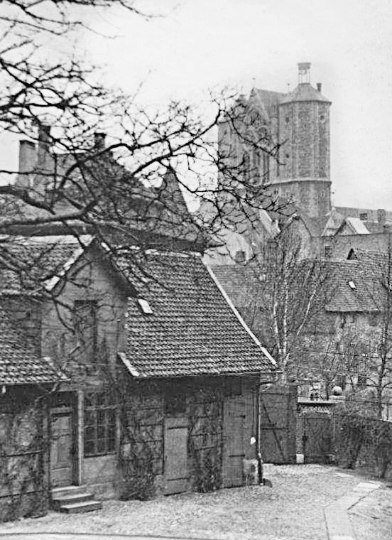 Braunschweig, Maria-Magdalenen-Kapelle: Blick aus dem Innenhof Richtung Braunschweiger Dom.